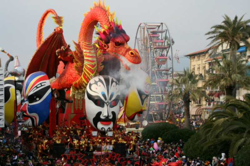 Danza del Drago - uno dei carri del Carnevale di Viareggio 2010